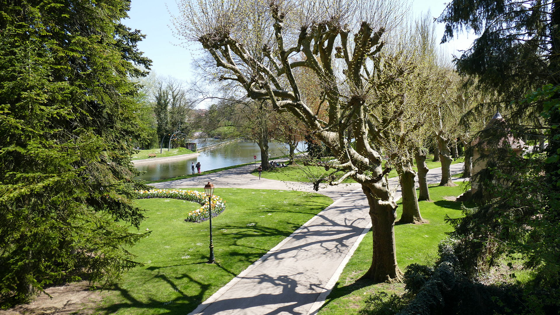 Auxerre - Parc de l'Arbre Sec